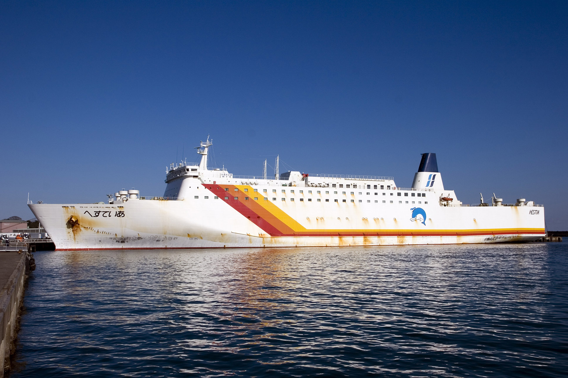 フェリー「へすていあ」。大洗港にて。